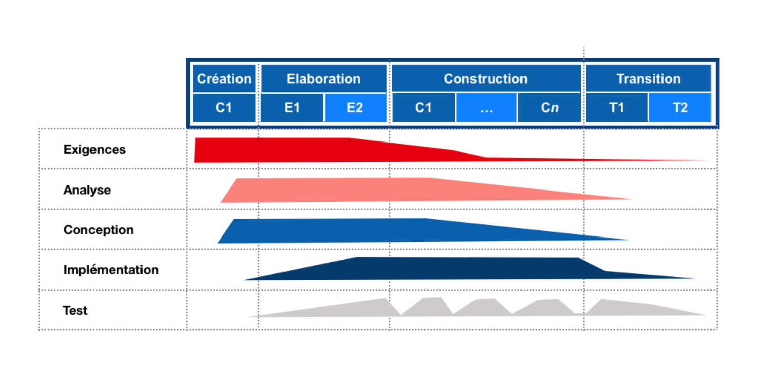 Enchainements d'activités au cours du cycle de vie de développement de logiciel selon le processus unifié